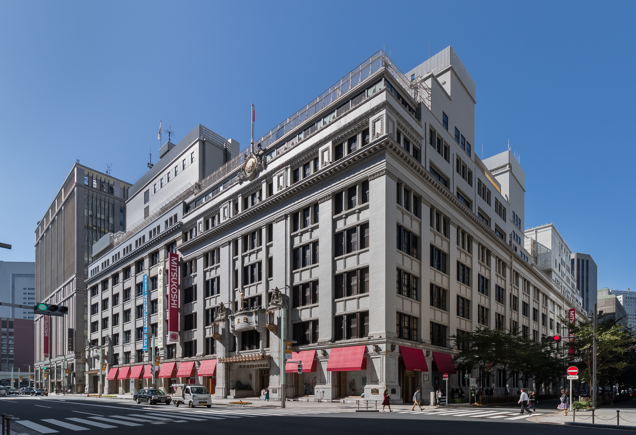 三越日本橋本店本館（重要文化財）。横河工務所設計（1914年）。